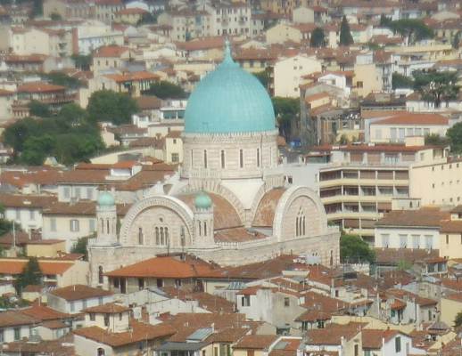 Sinagoga firenze view